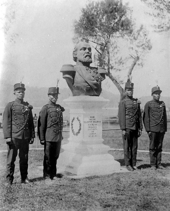 Repronegatief. Militairen bij het standbeeld van Koning Willem III op Banda